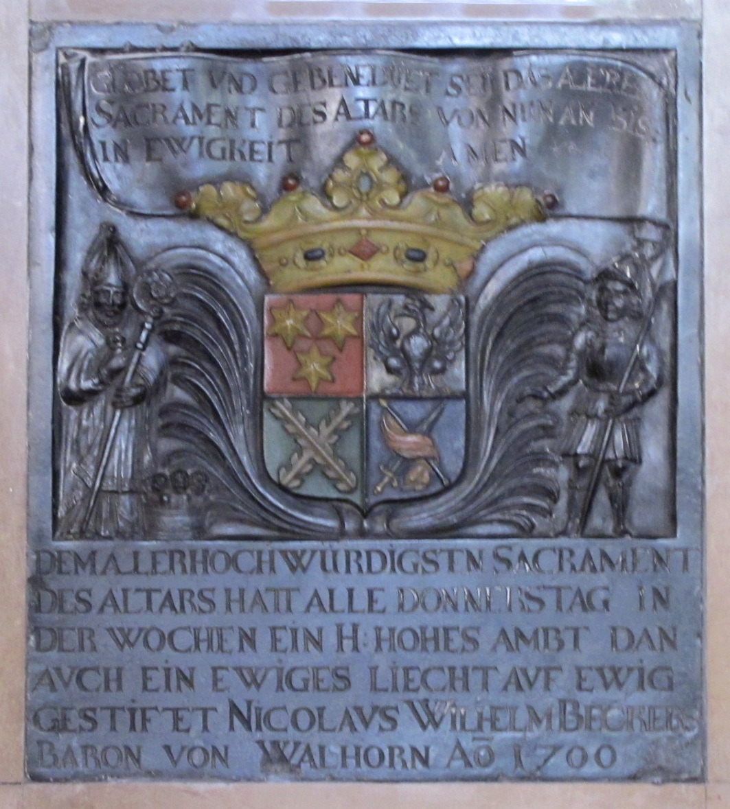 Stiftungsplakette Anno 1700, mit Wappen des Baron Beckers von Walhorn und Schönkirchen, in der Kirche zu Walhorn